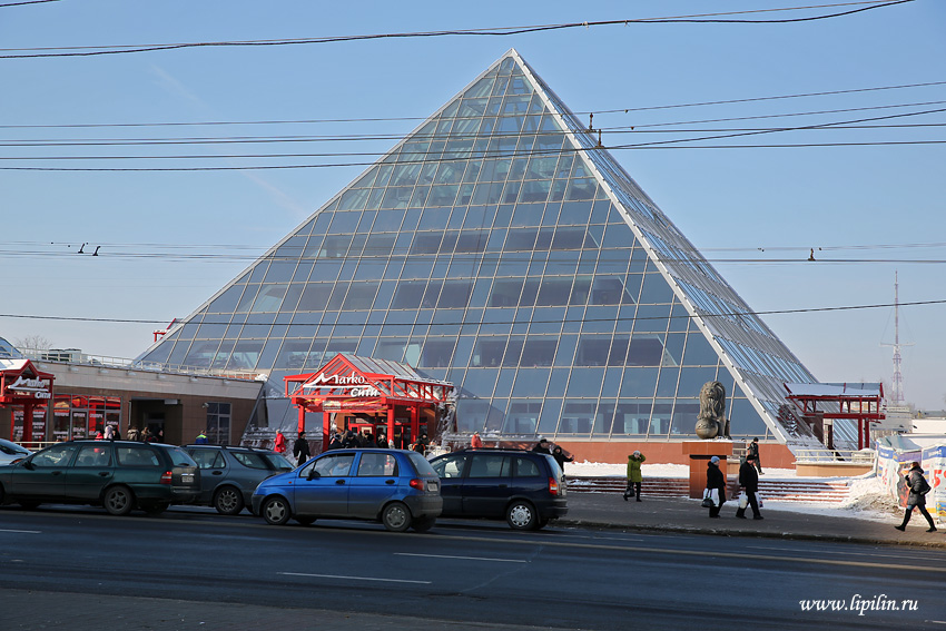 Віцебск.